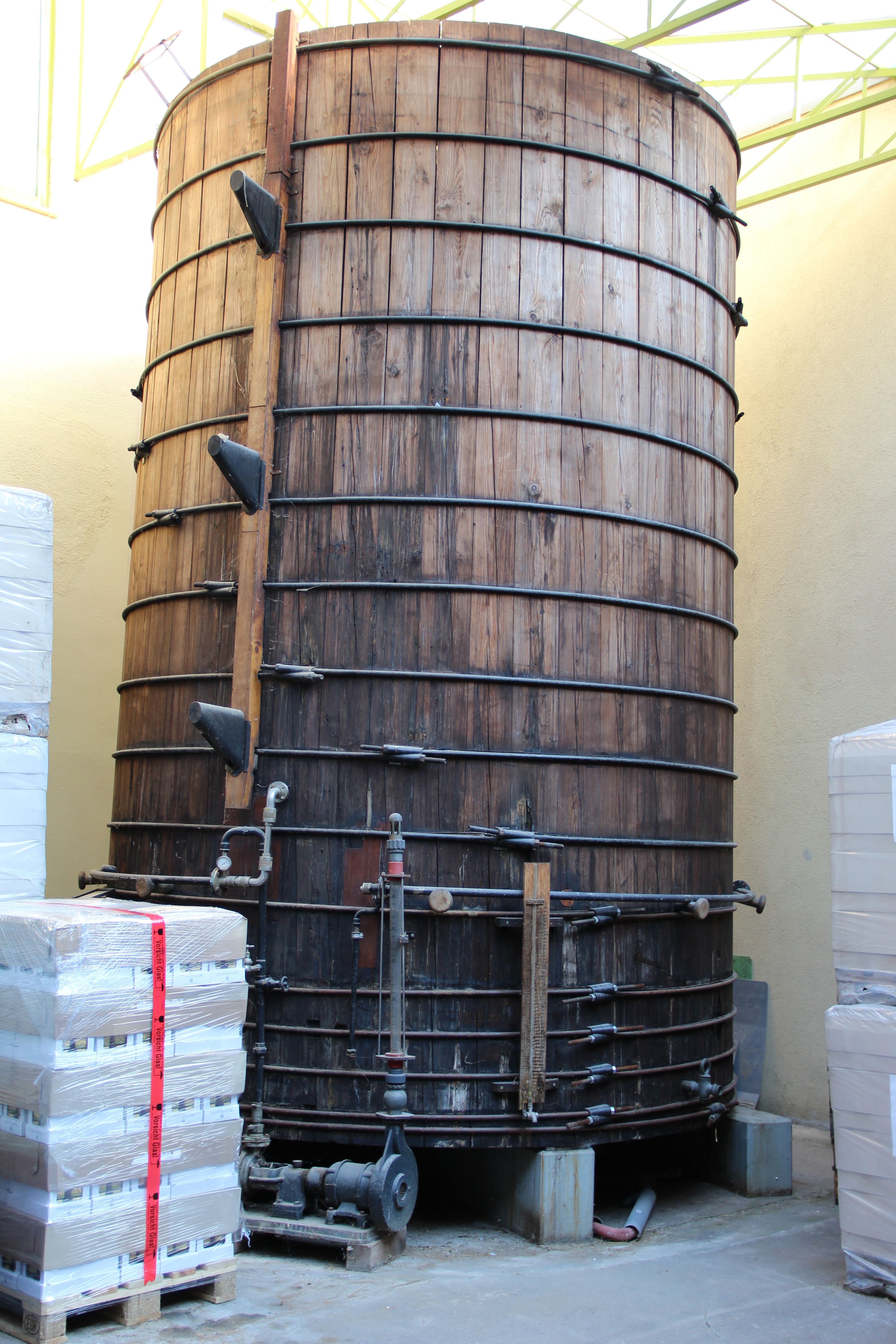 Holzbottich für das Submersverfahren in der Wiener Essigbrauerei in der Waldgasse in Wien-Favoriten während OpenHouseWien 2015. Die Brauerei beherbergt neben einem Verkaufsladen im ersten Stock Hotelzimmmer.